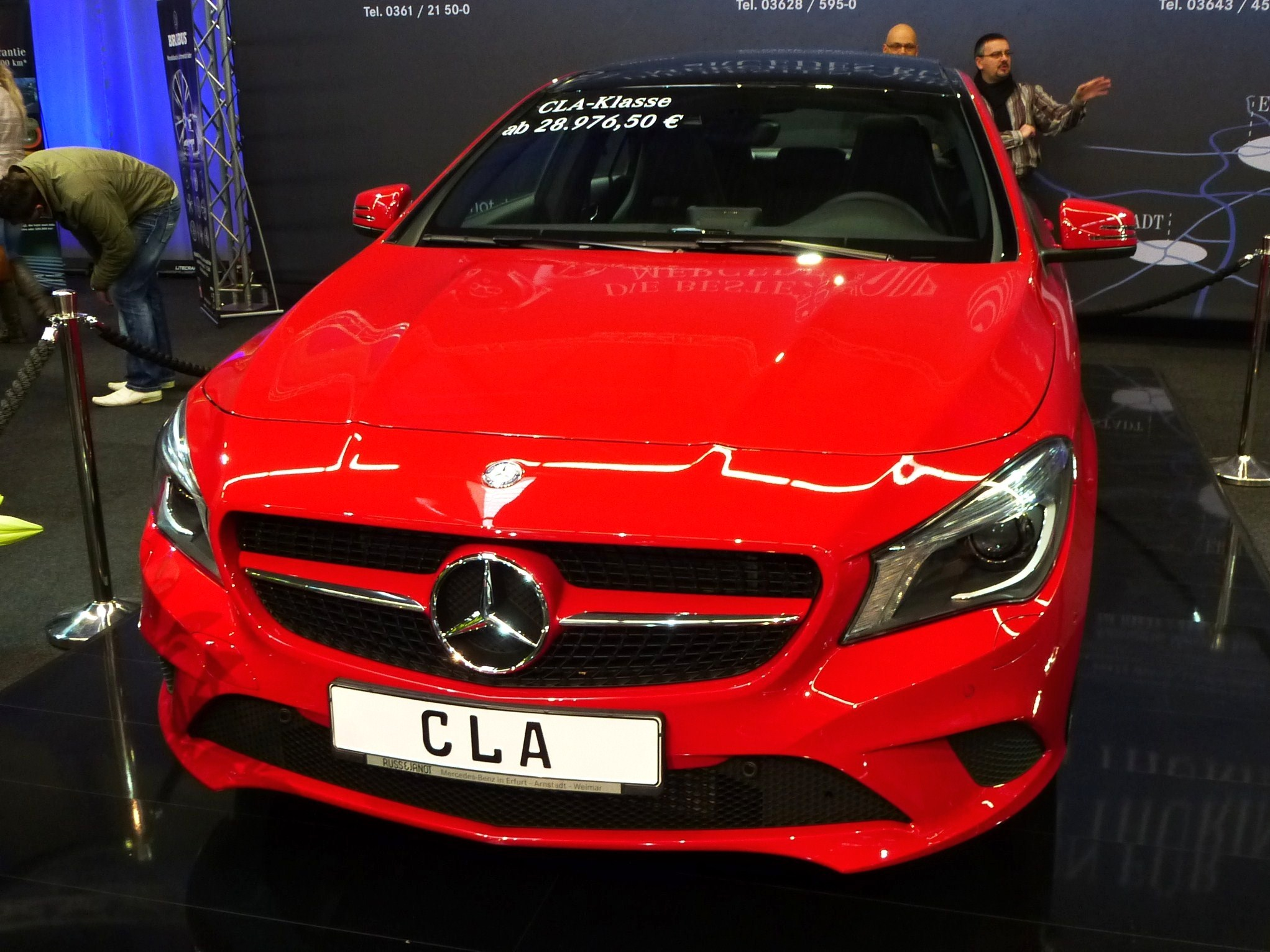 Mercedes-Benz CLA 220 CDI